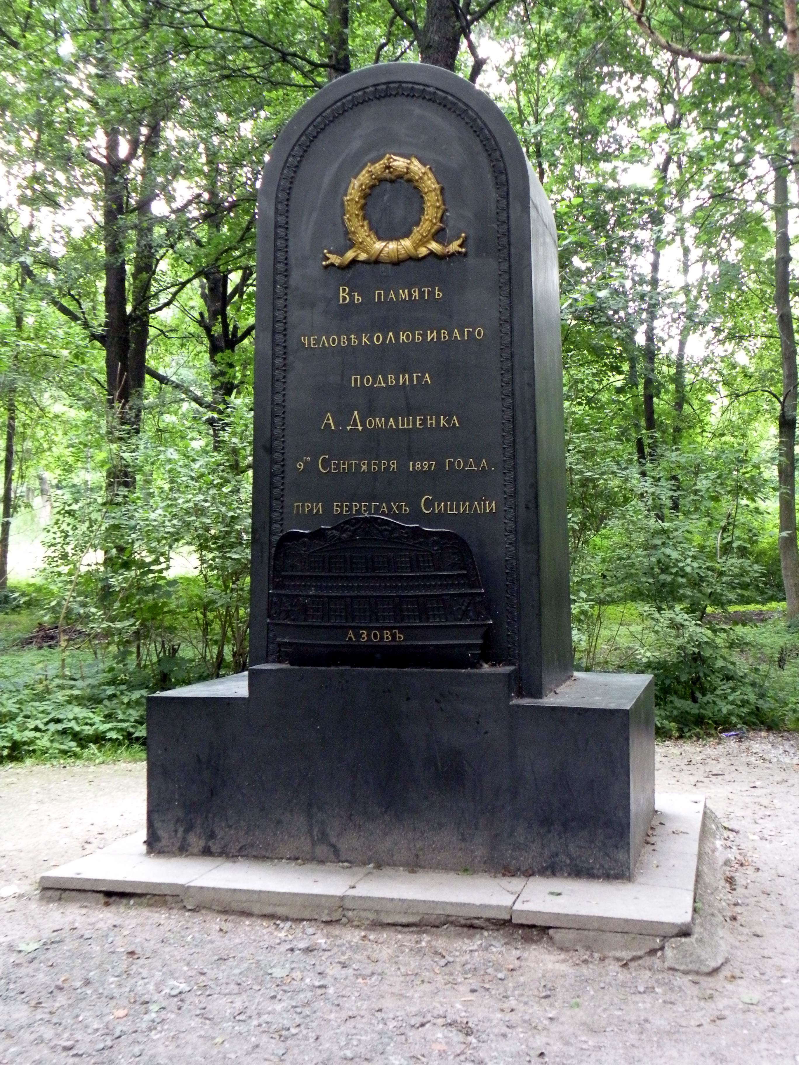 Кронштадт.Памятник мичману Домашенко.